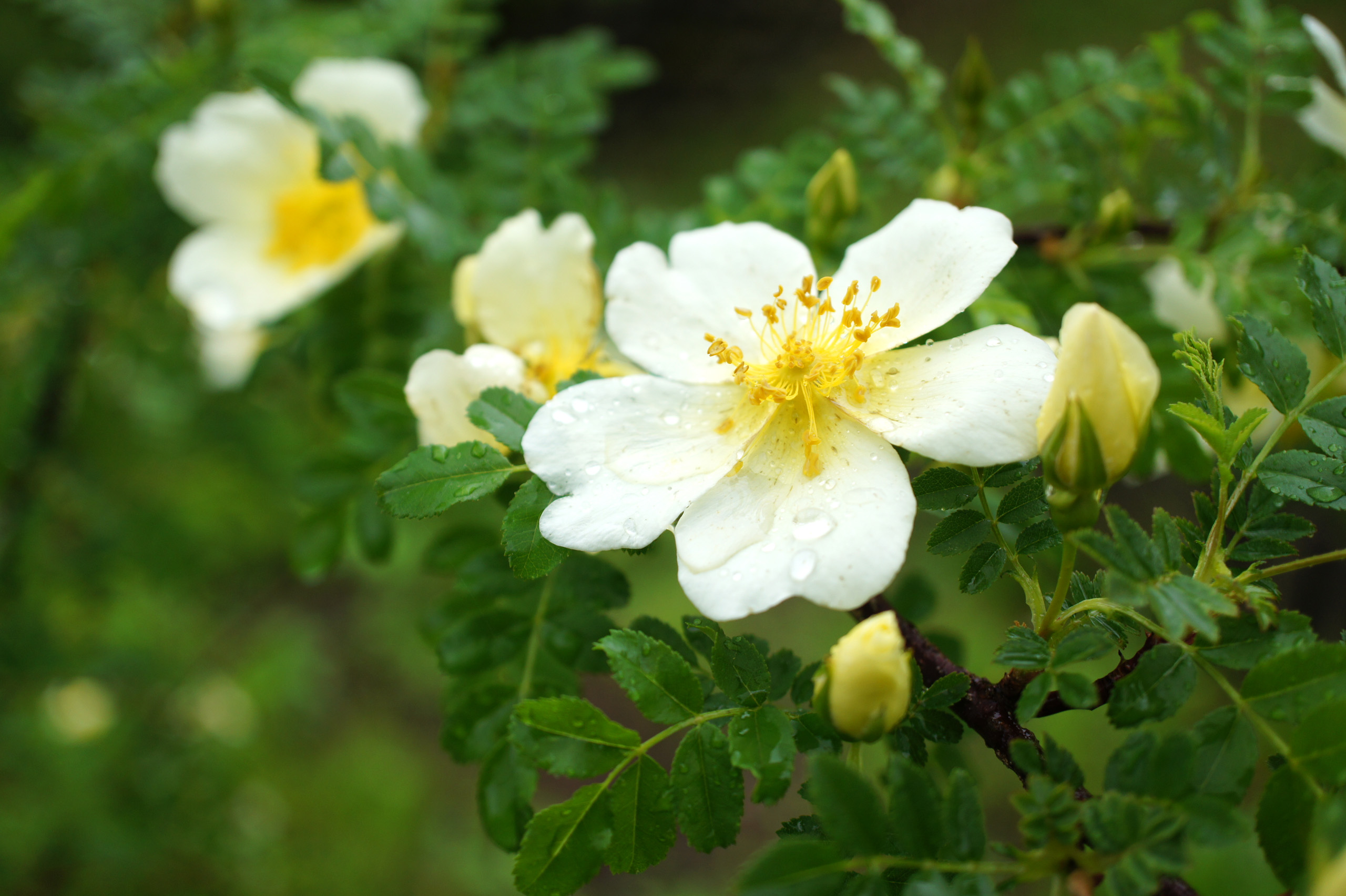 Rose Rosa primula バラ ロサプリムラ species rose 原種 EUROSA エウロサ亜属 Pimpinellifoliae ピンピネリフォーリア節